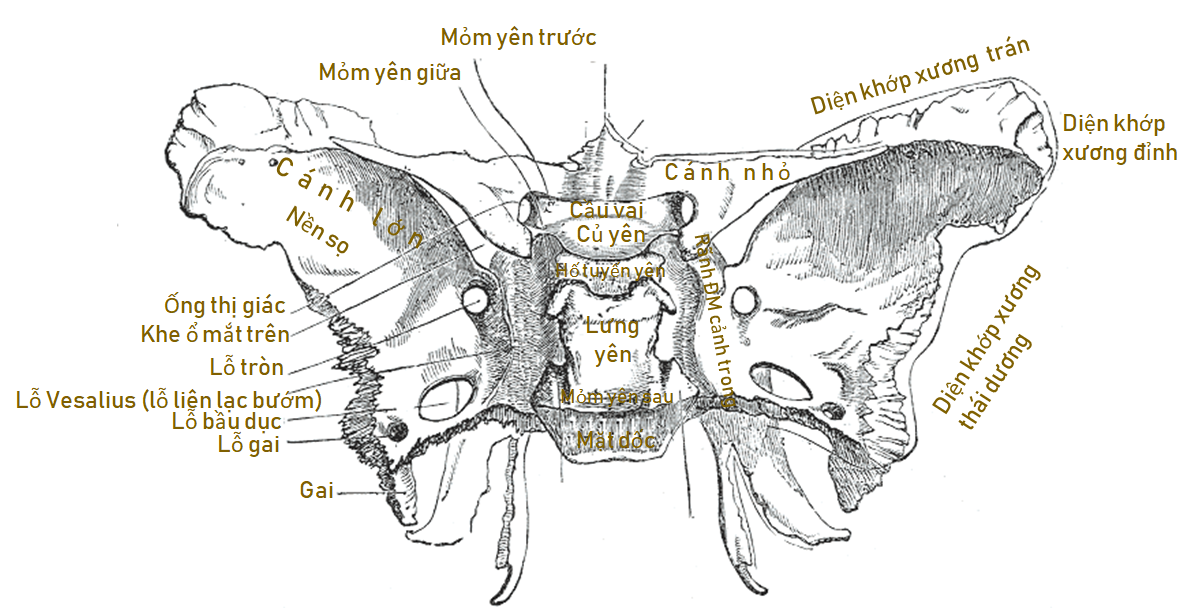 Gray145